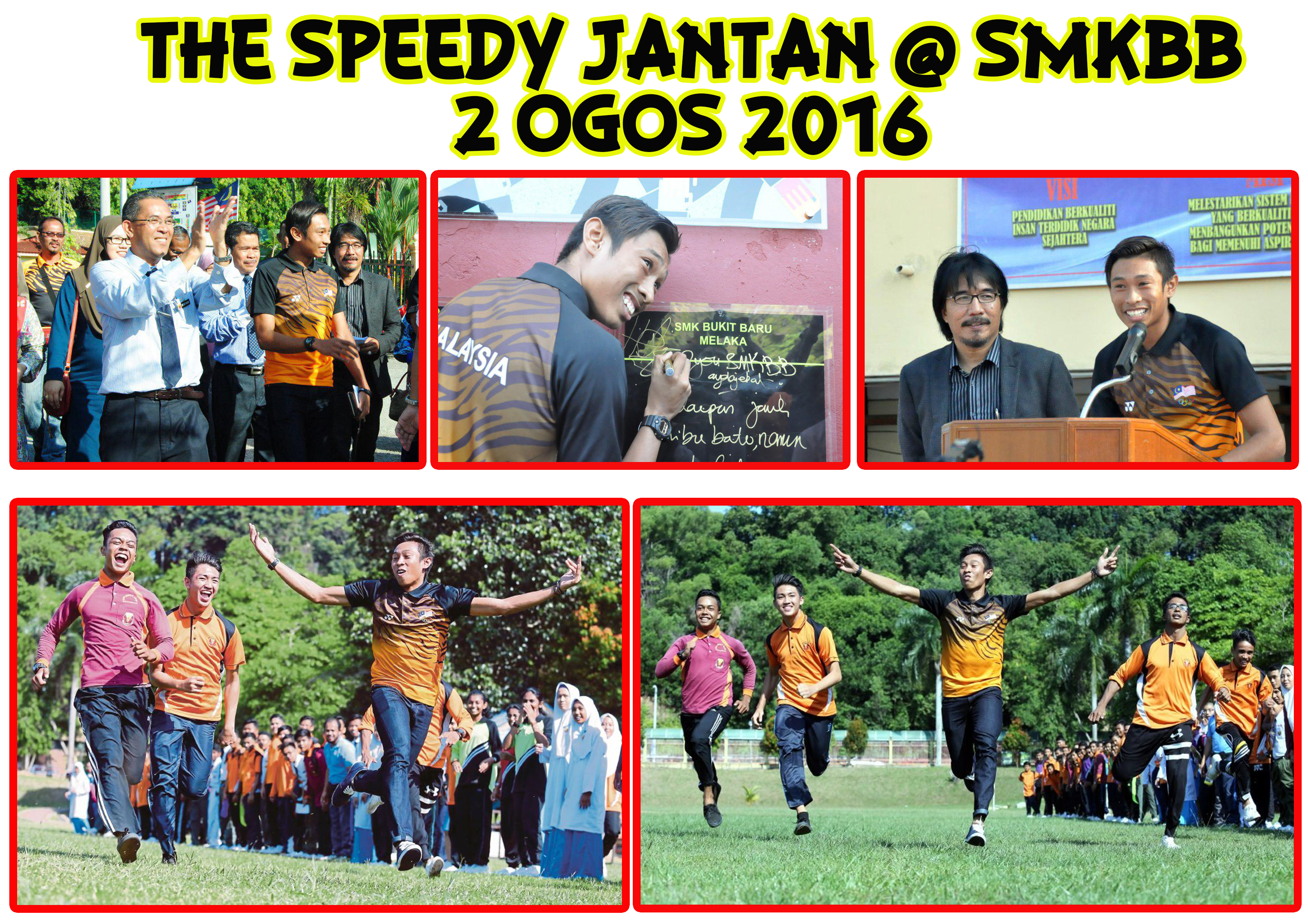 Khairul Hafiz Jantan